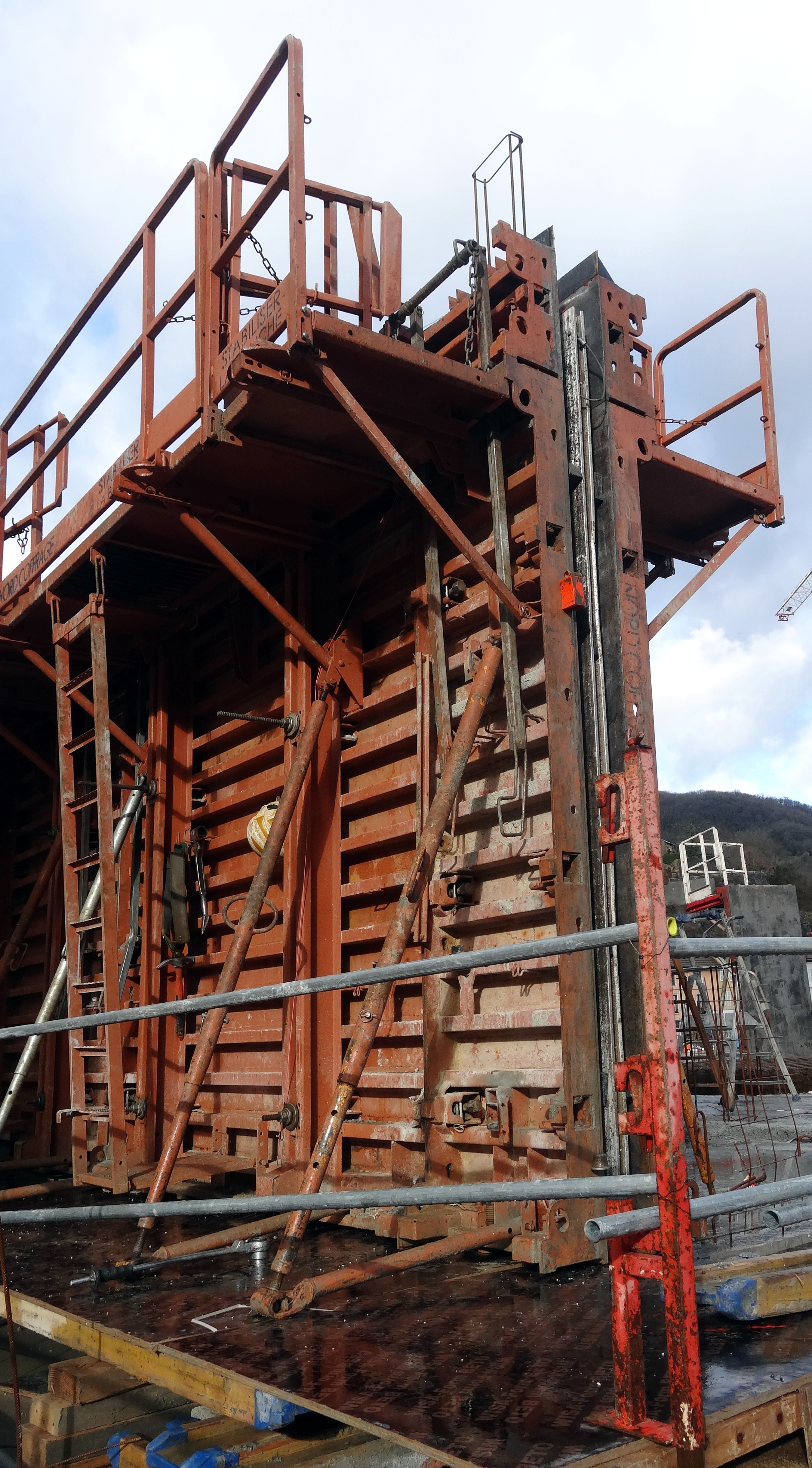 Coffrages métalliques